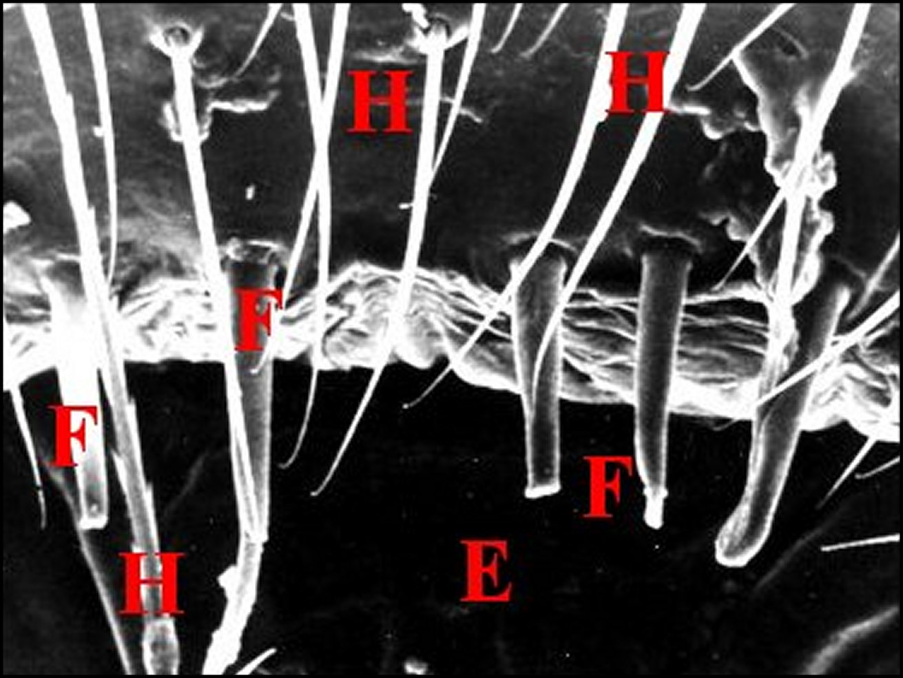 Fusules épigastriques de Pholcus phalangioides vues au microscope électronique à balayage